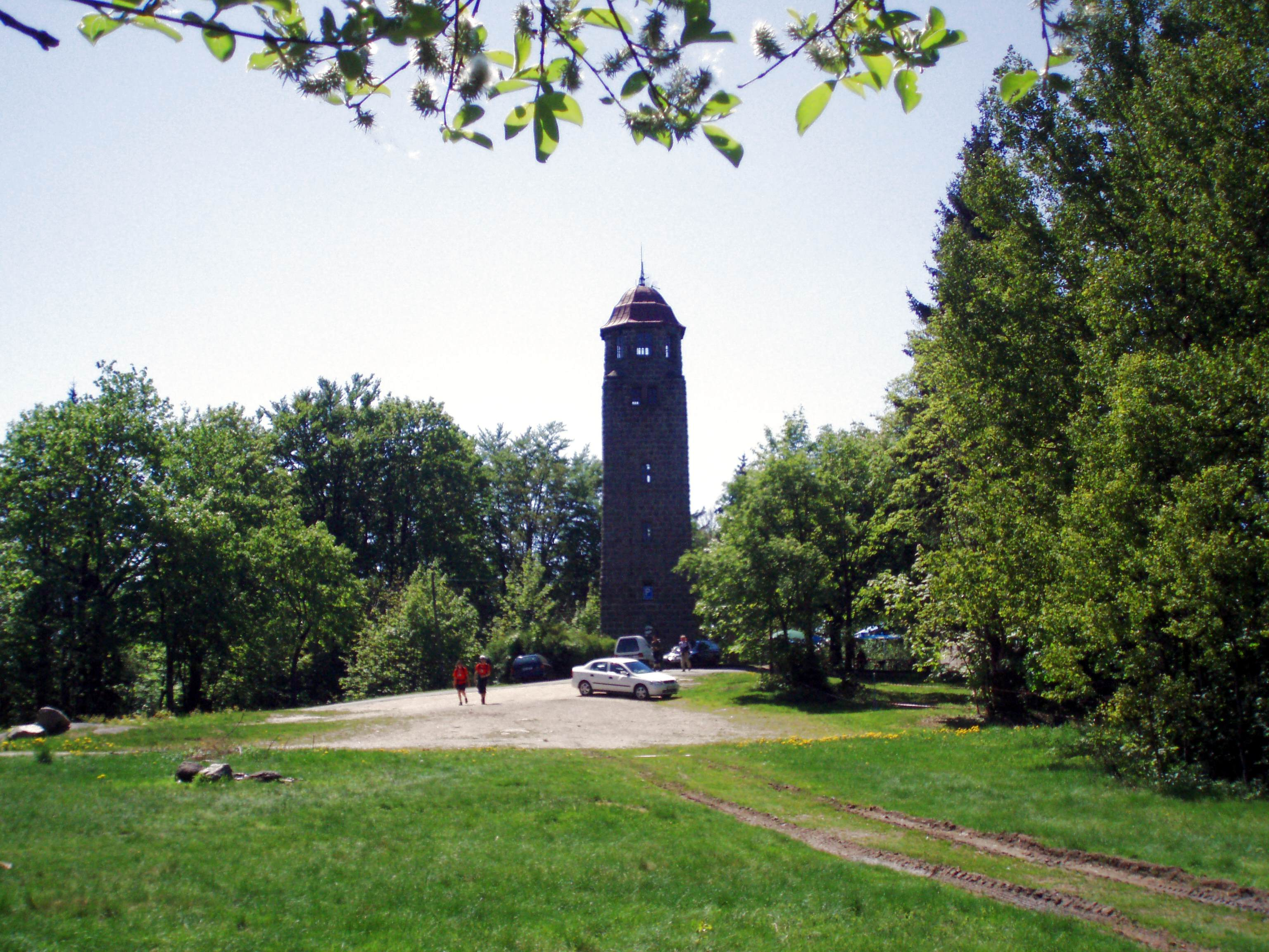 Aussichtsturm auf dem Bramberk